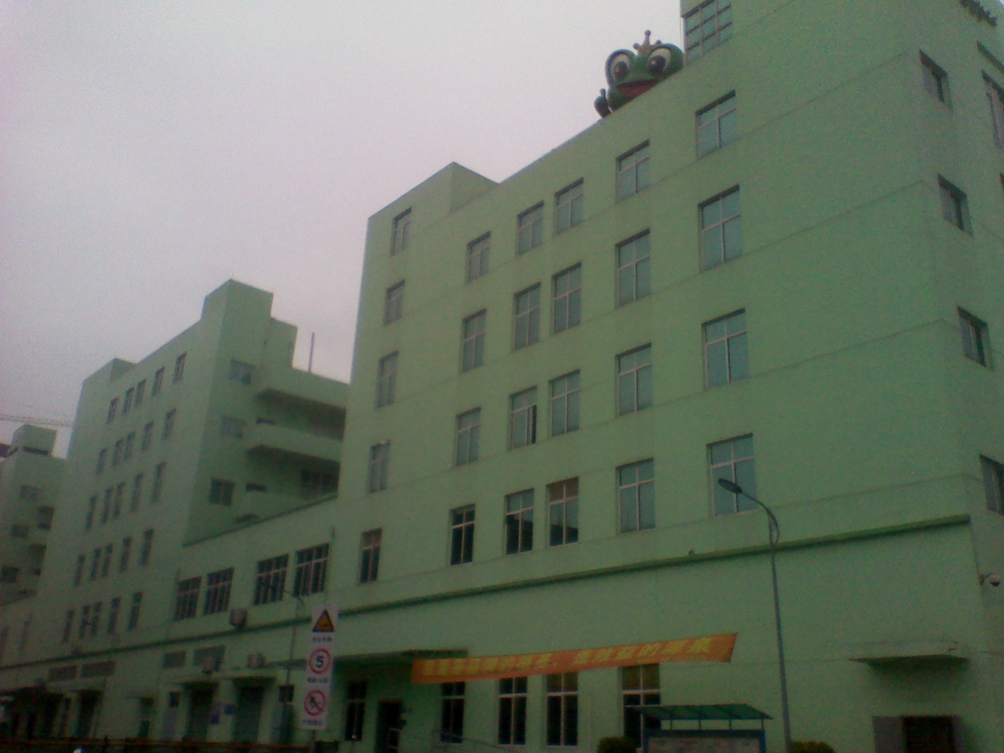 青蛙王子日化有限责任公司